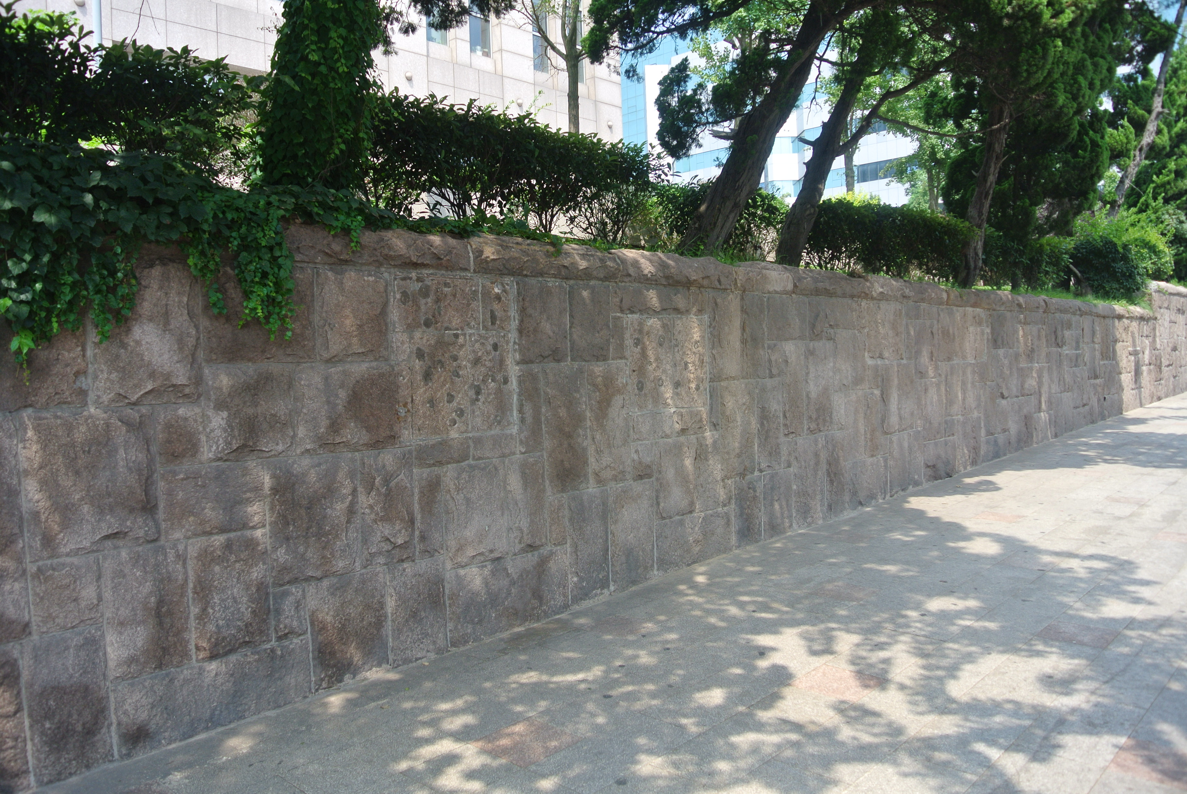 青岛中山路水交社院墙